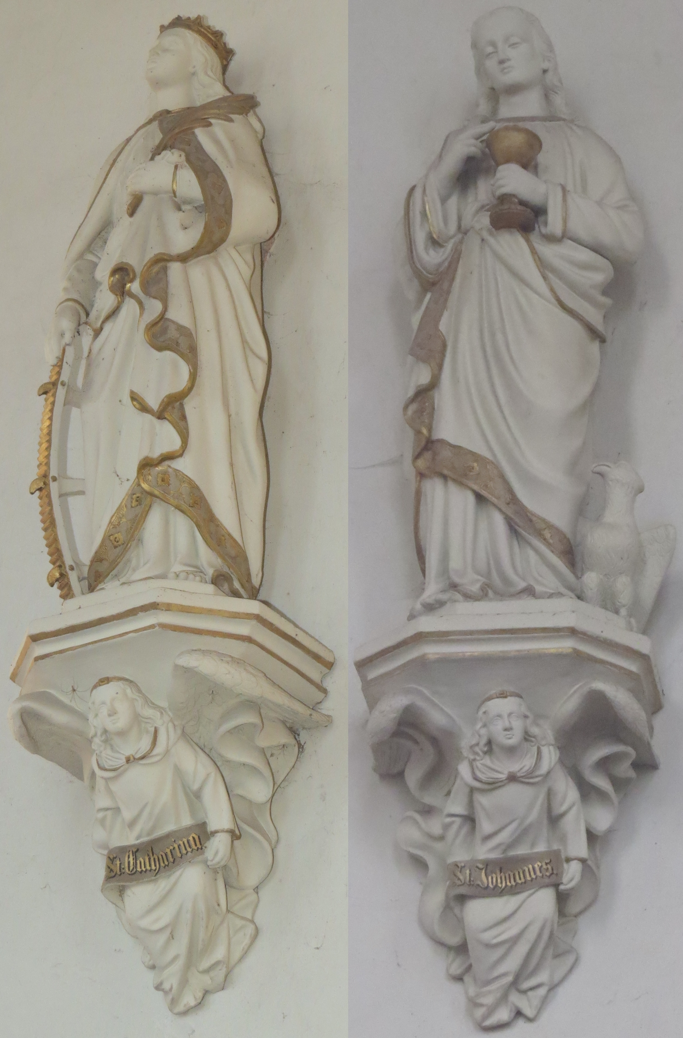 Fotomontage zweier Skulpturen aus dem Kircheninnenraum der Filialkirche St. Markus Minkelfeld, Ortsteil von Kerben, Deutschland. Sie zeigt links Katharina von Alexandrien und rechts Johannes Evangelsta.